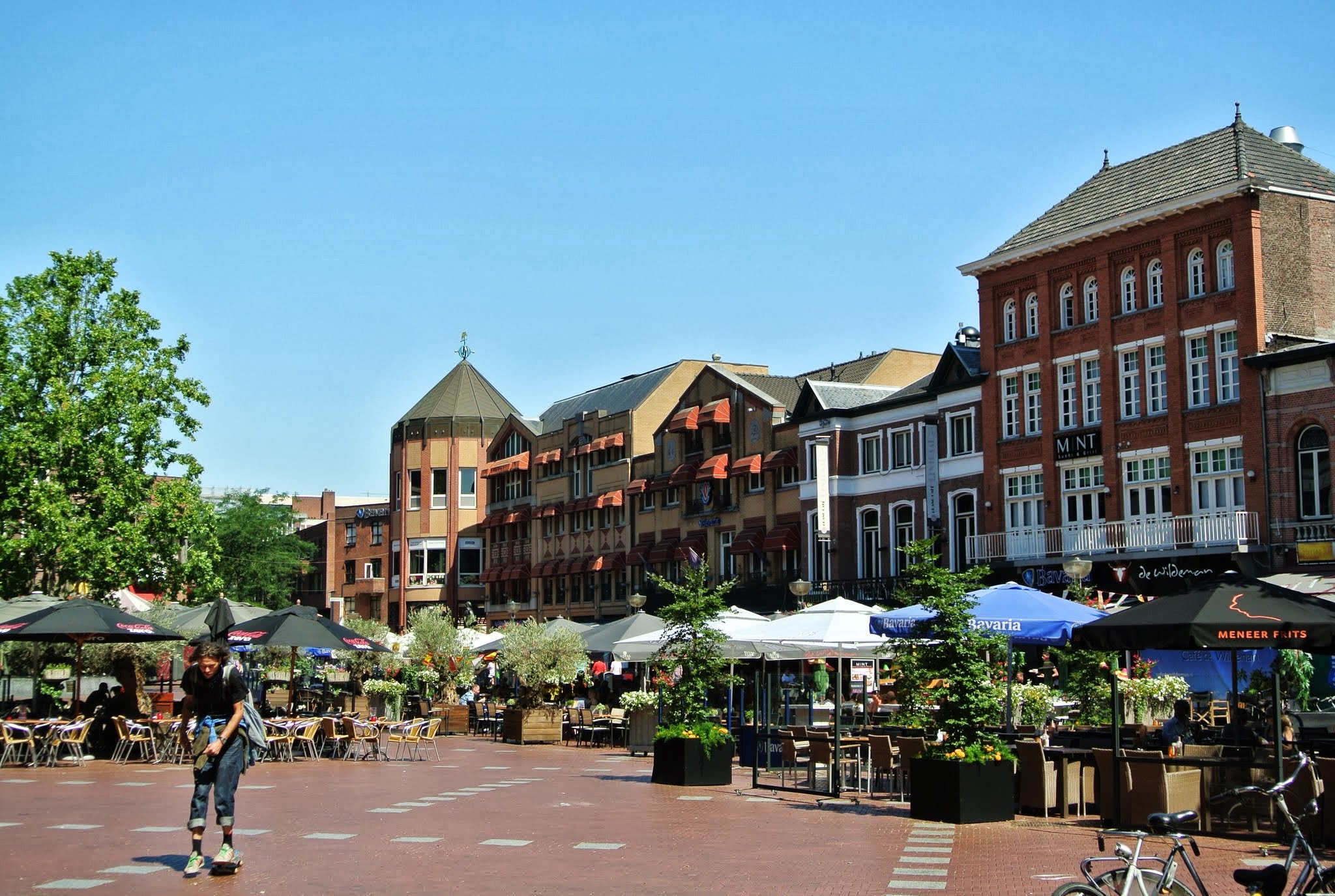 Binnenstad, 5611 Eindhoven, Netherlands